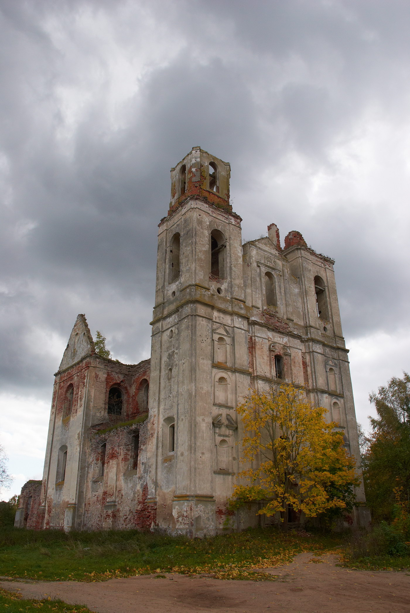 Беларуская (тарашкевіца): Былы кляштар бэрнардынаў:касцёлкляштарны жылы корпус. в. Селішча This is a photo of Belarusian heritage monument. Reference number: 212Г000807 ( WLM)